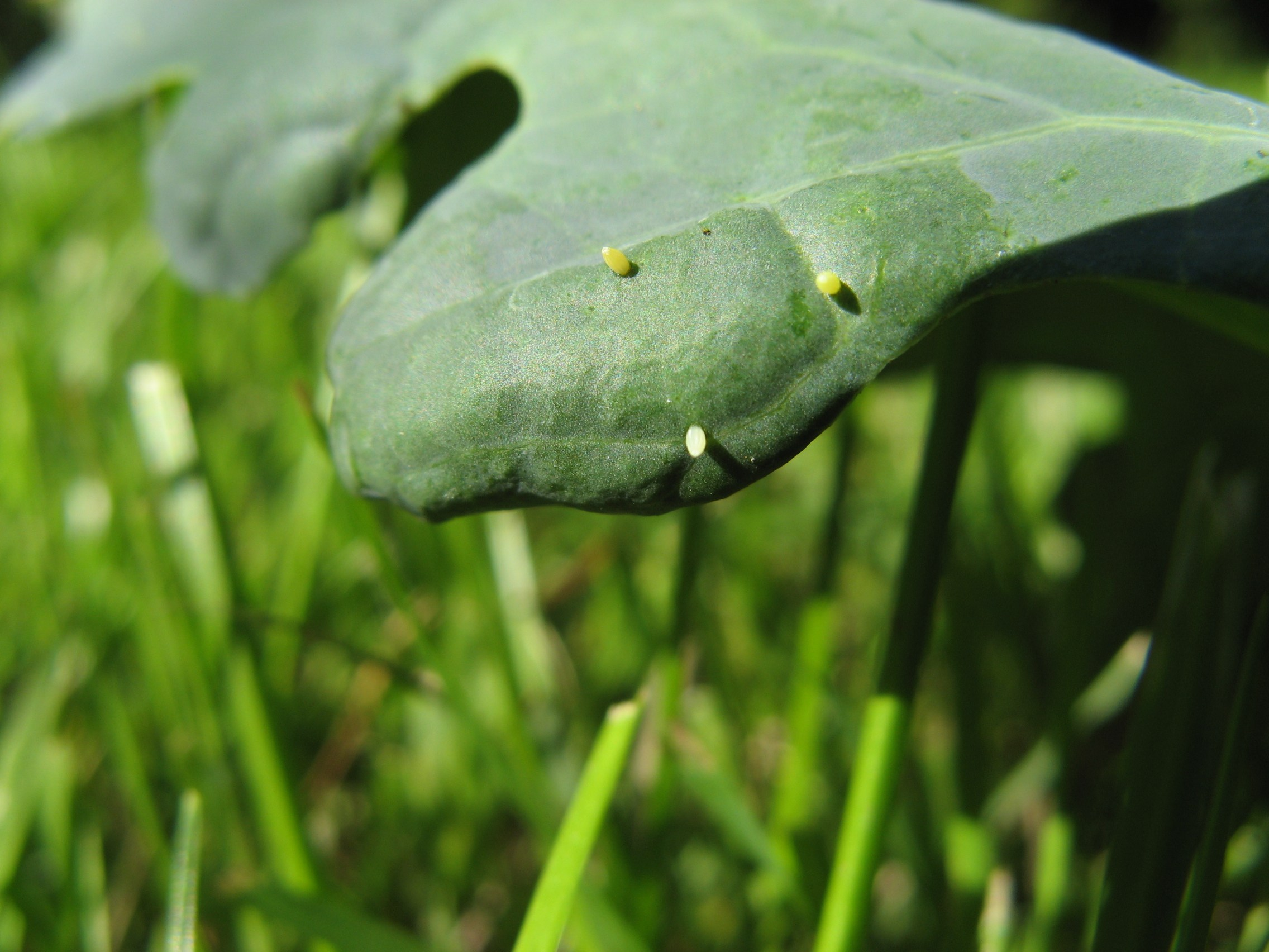 frisch abgelegte Eier eines Kohlweißlings (Pieris Rapae)